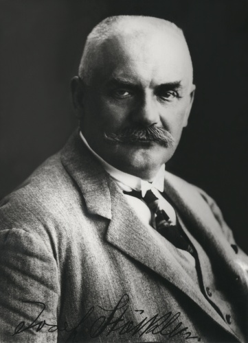 Josef Stöckler (1866 - 1936), Rakouský politik.